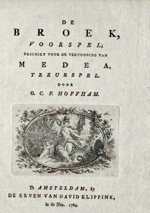 Titelblad van De Broek: voorspel, geschikt voor de vertooning van Medea